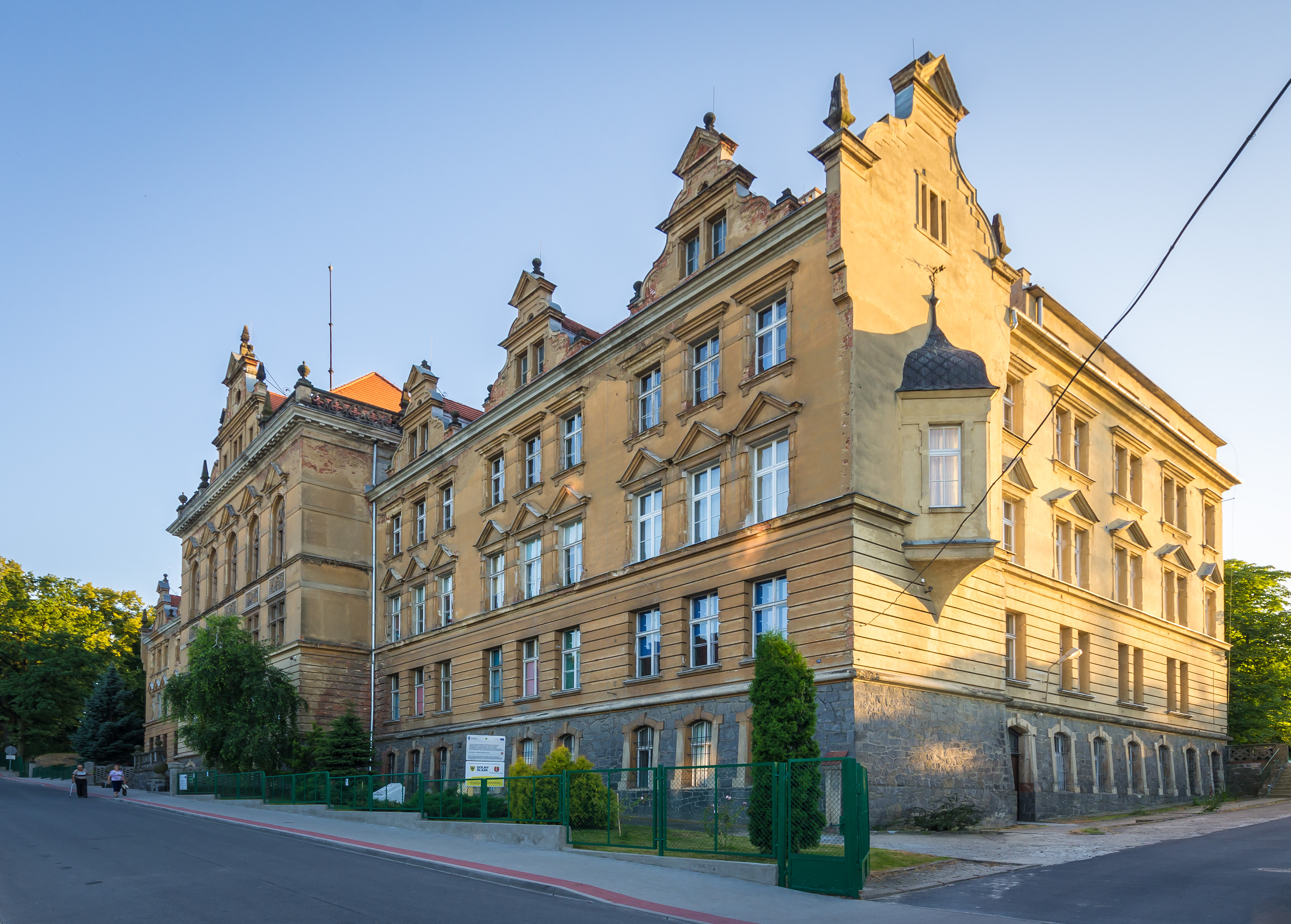 Piława Górna, gimnazjum, ob. ośrodek szkolno-wychowawczy, 1894-1896 This photo of Lower Silesian Voivodeship was taken during Wikiexpedition 2013 set up by Wikimedia Polska Association.You can see all photographs in category Wikiekspedycja 2013.